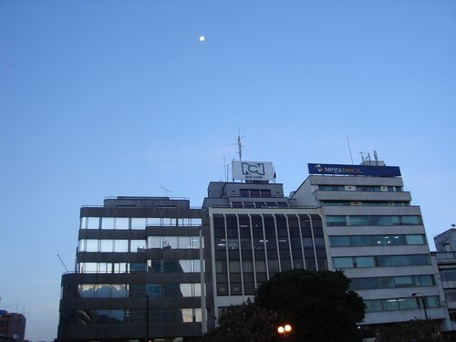 Duitama Hermosa